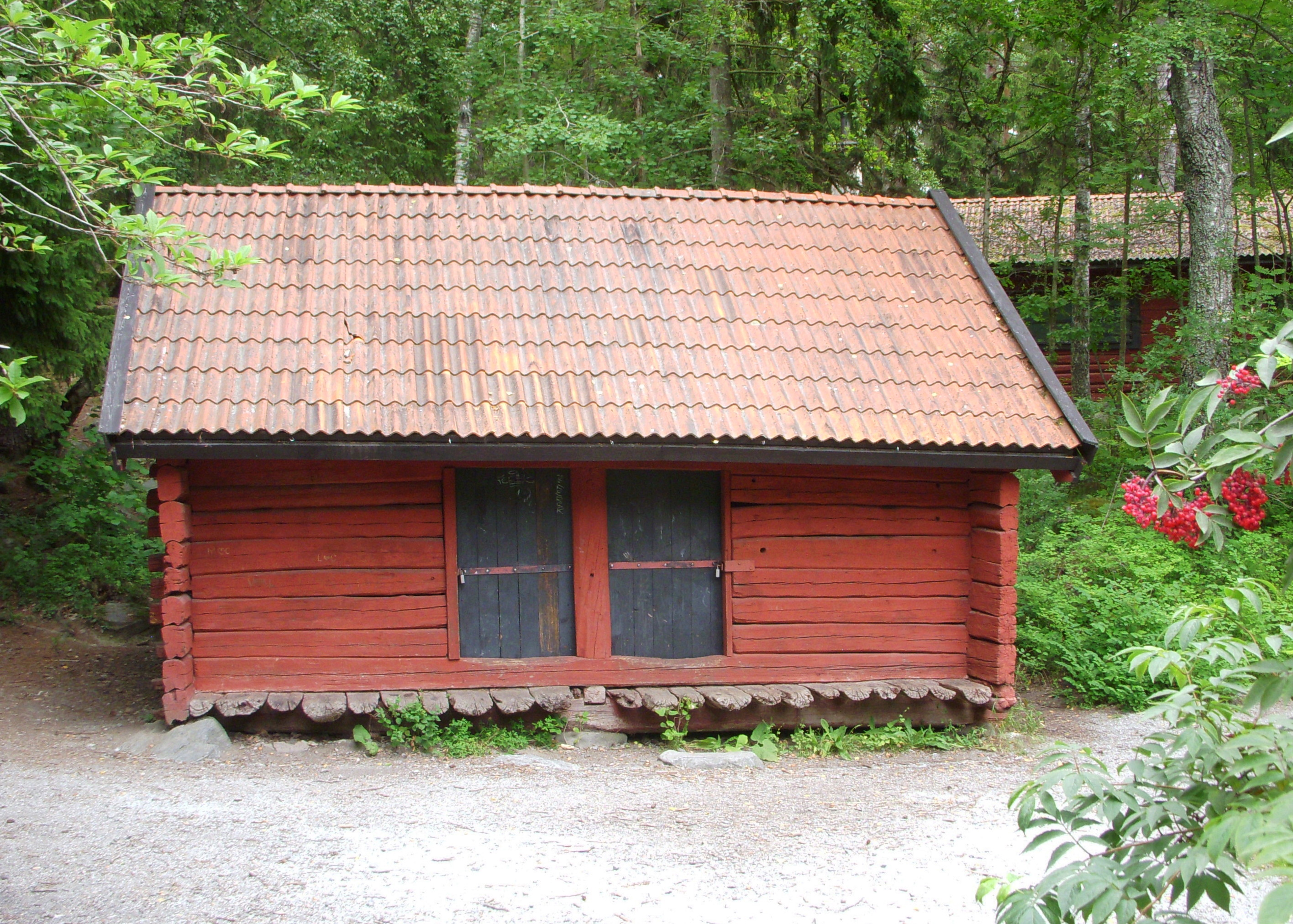 Bod vid torpet Lugnet, stod fram till 1932 vid Igeltorp i Salems socken